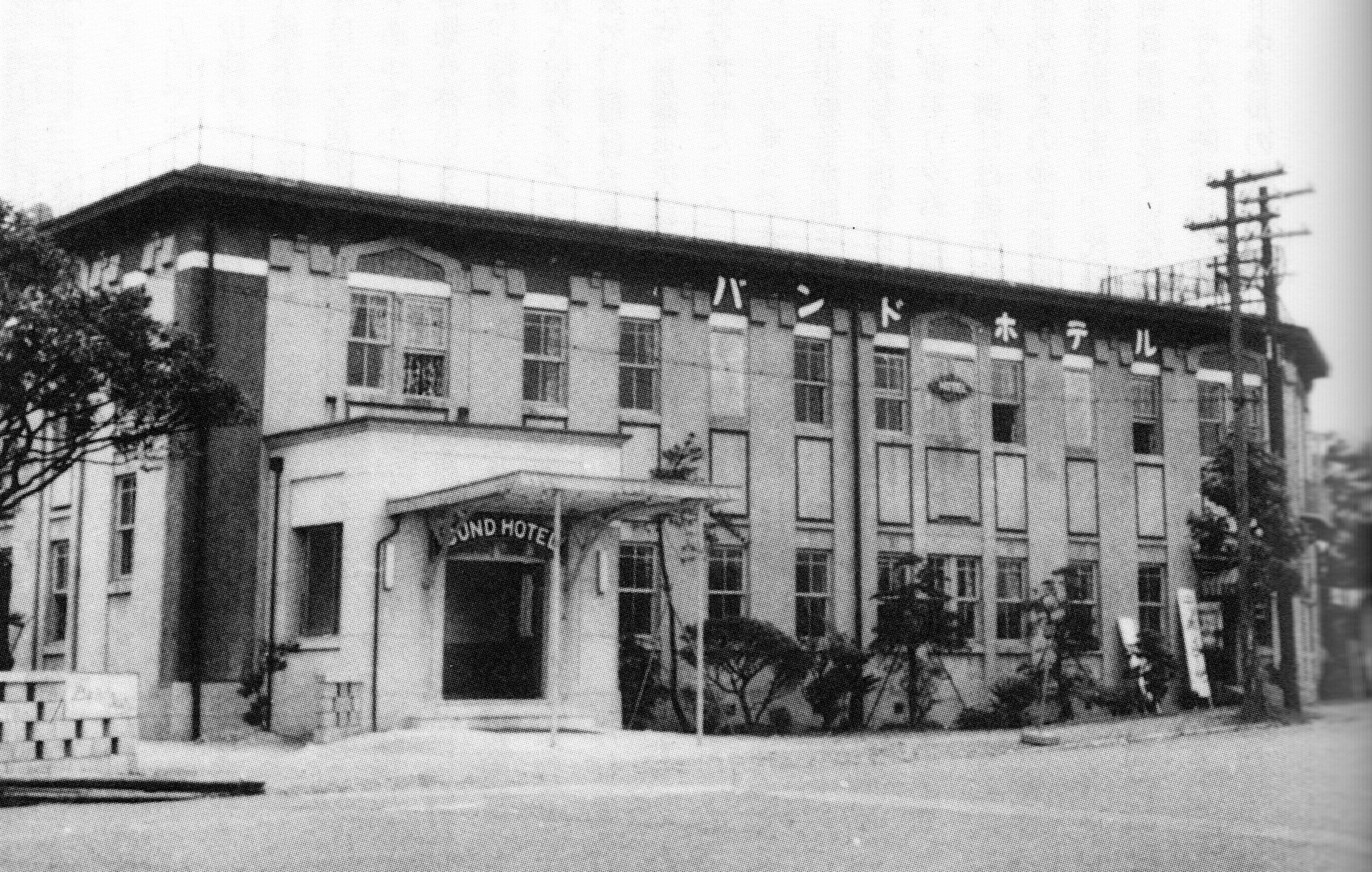 1929年に横浜の海岸通りに創業したバンドホテル。